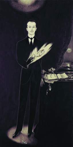 Self-portrait